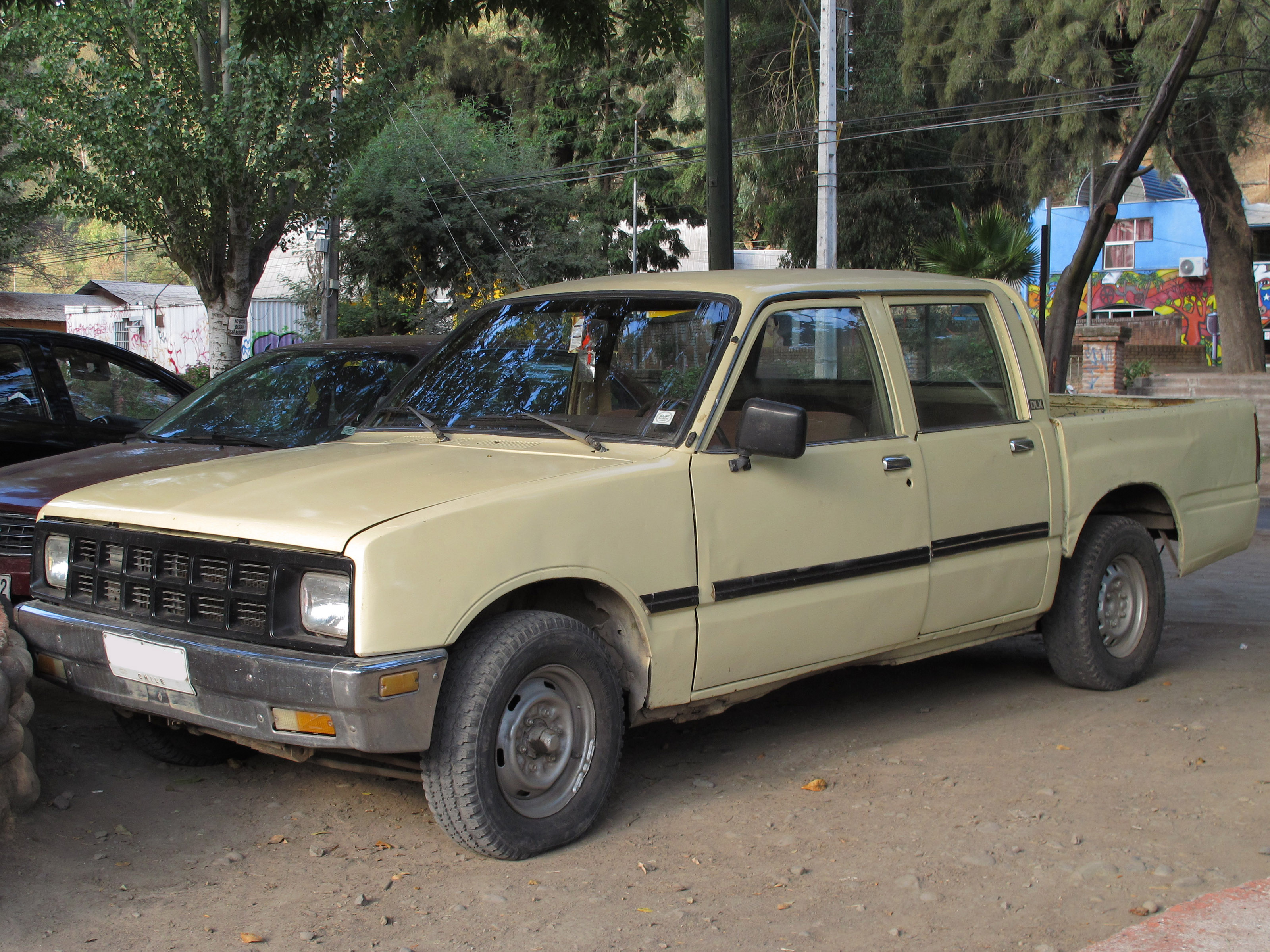 Chevrolet Luv 1600 DLX Crew Cab 1985